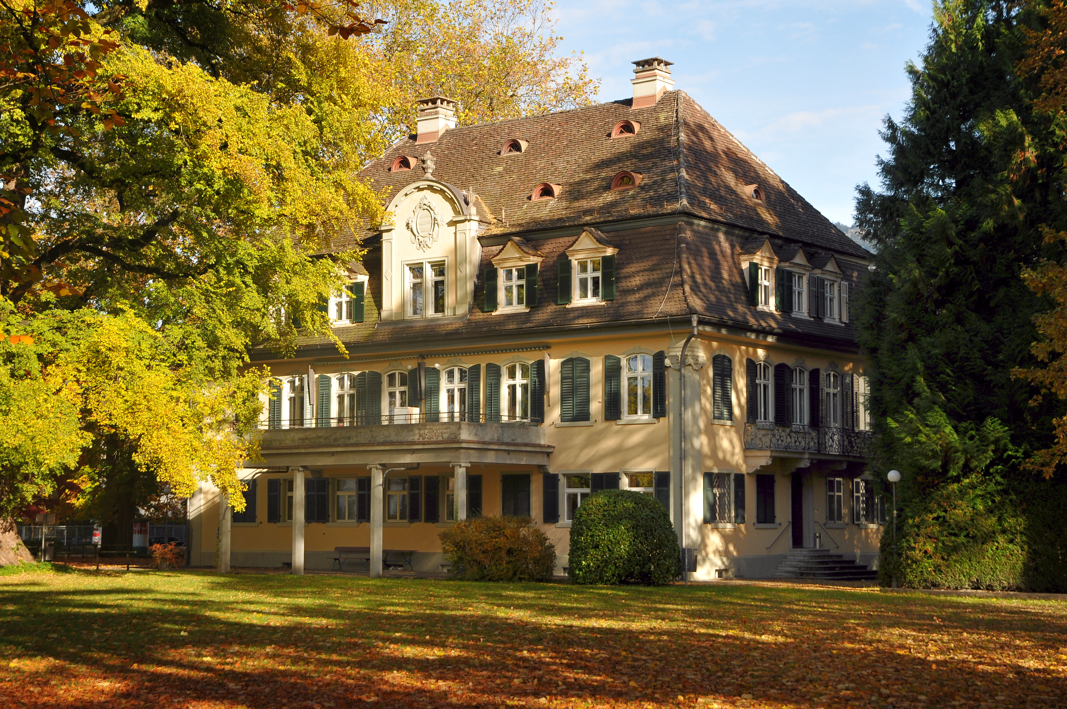 aus dem DEHIO Vorarlberg 1983: (Römerstrasse) Arlbergstrasse Nr.66: Villa Liebenstein, in spitzwinkeligem Zwickel zwischen Arlbergstraße und Riedergasse. Späthistoristisch, von Johann Anton Tscharner, 1915 Umbau durch Ziegler, 1922 durch Palmer. Besonderer Repräsentationskarakter durch neobarocke Formen, Mansardwalmdach, Straßenseitig 8 Fensterachsen, Dacherker mit Rundbogenschluß, Gaupen. Eingang schmalseitig mit als Balkon dienender Verdachung, originale Parkanlage mit Einfriedung. *** Quelle 2: Vermutlicher Erbauer: Freiherr Gustav Adolf von Liebenstein, k.k. Leutnant und Gutsbesitzer in Rieden. Ab 1880 Handelsschule des Direktors Alwin Hauser, 1910 im Besitz der Familie Schoeller. Nach dem Zweiten Weltkrieg: Dienststelle der französischen Besatzungsmacht. 1953 trat Rudolf Schoeller die Villa an die Wollgarnspinnerei Schoeller Ges.m.b.H. ab. Seit 1982 im Besitz der Stadt Bregenz. *** in Bregenz, Vorarlberg.